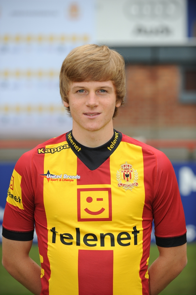 Belgisch voetballer, KV Mechelen